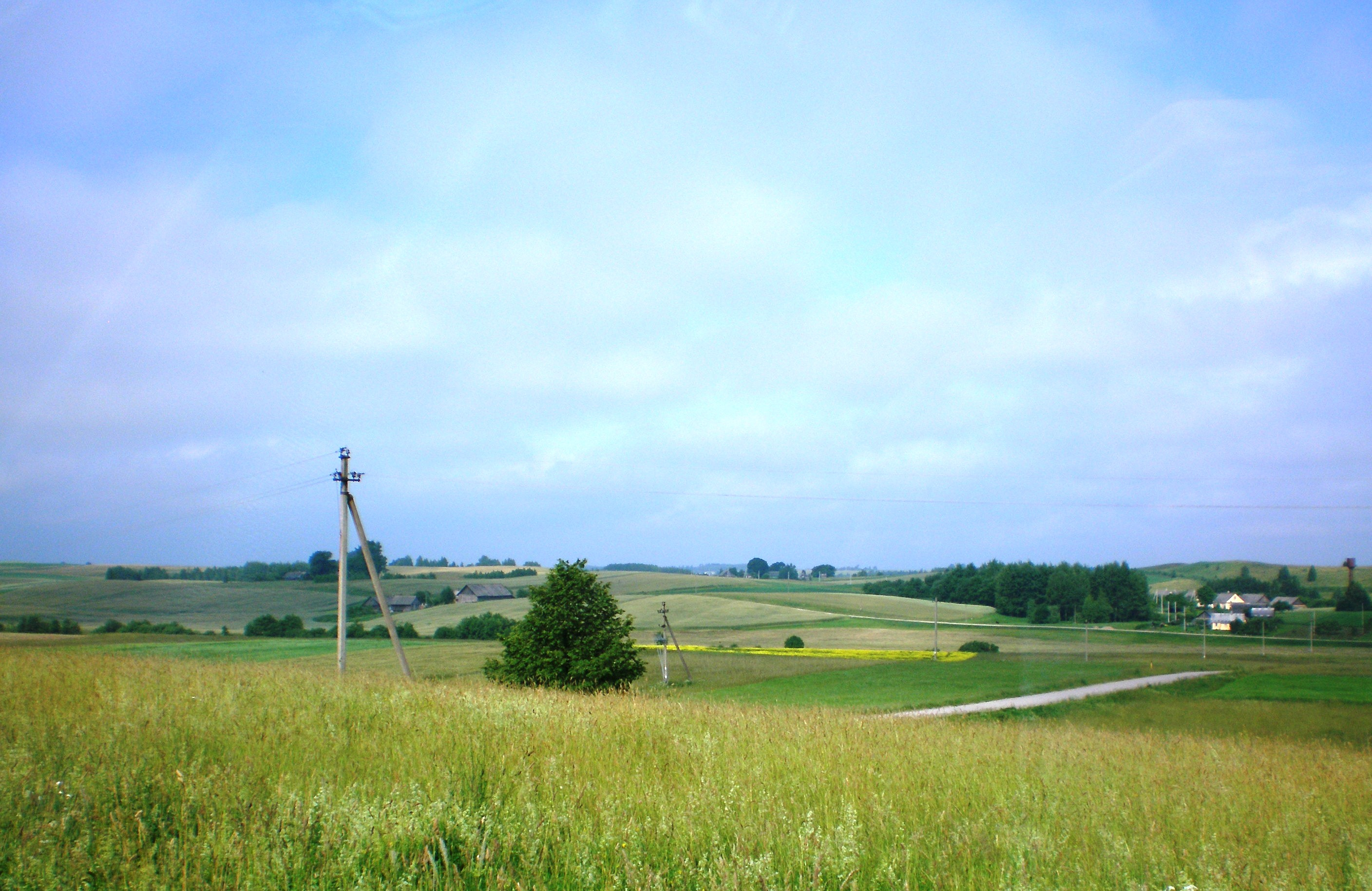 Dzūkų aukštuma netoli Viliūnų, Kaišiadorių raj.